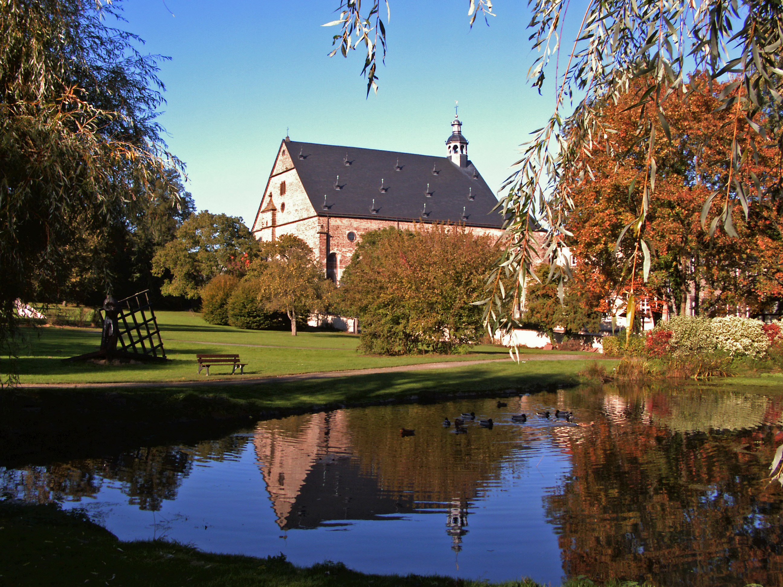 Katholische Kirche St. Hadrian und Dionysius in Lamspringe, mit Teich im Vordergrund